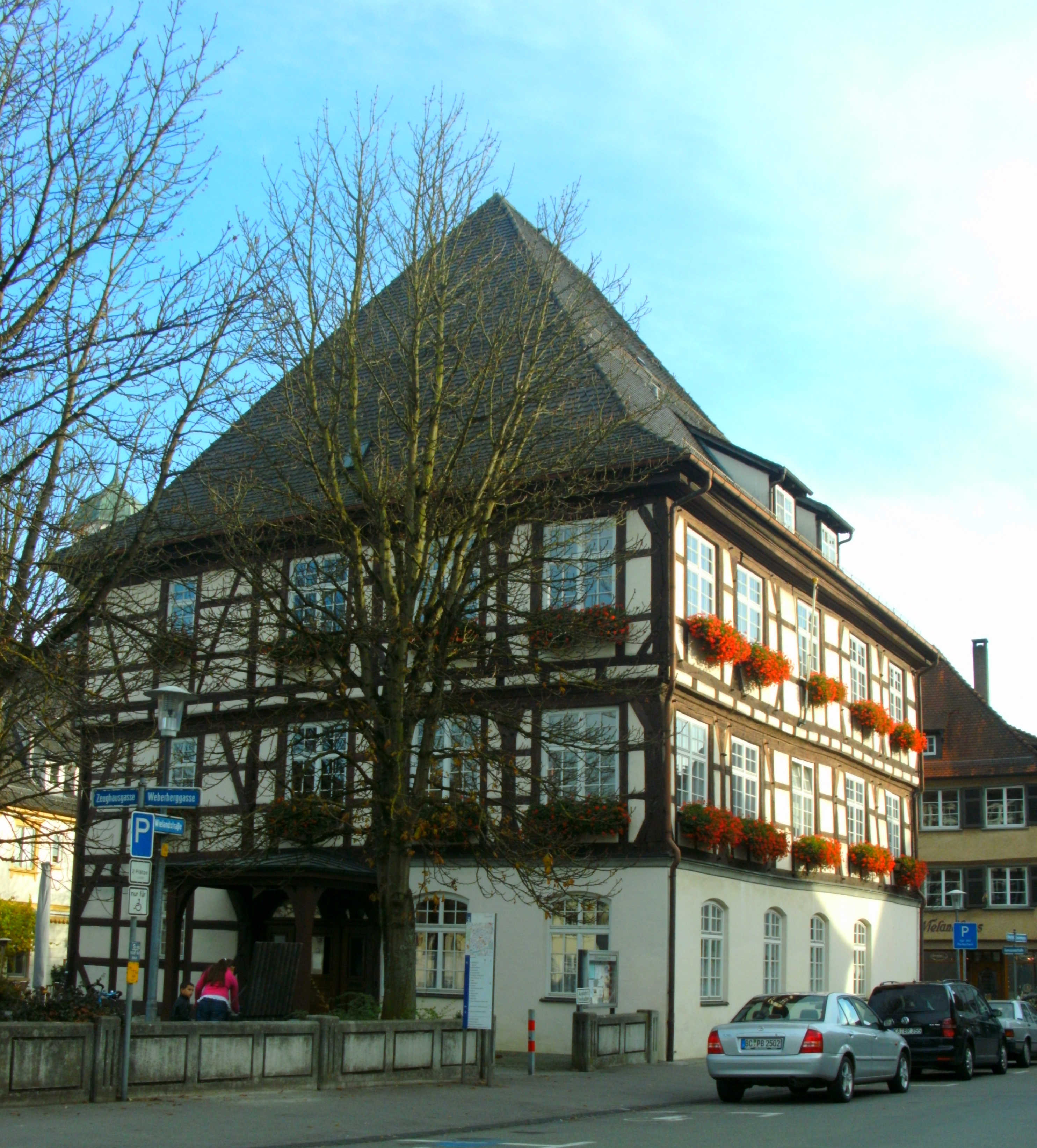 Ochsenhauser Hof